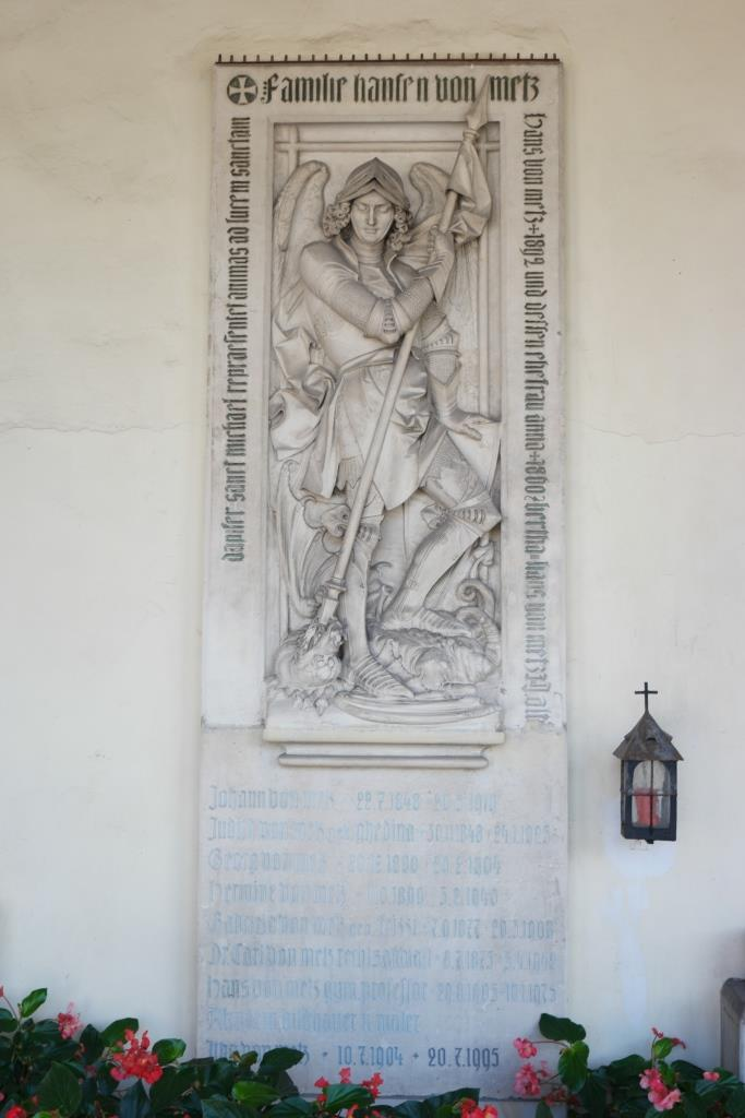 Grab des Malers und Bildhauers Hans Vonmetz (1905-1975) auf dem Friedhof Innsbruck-Wilten